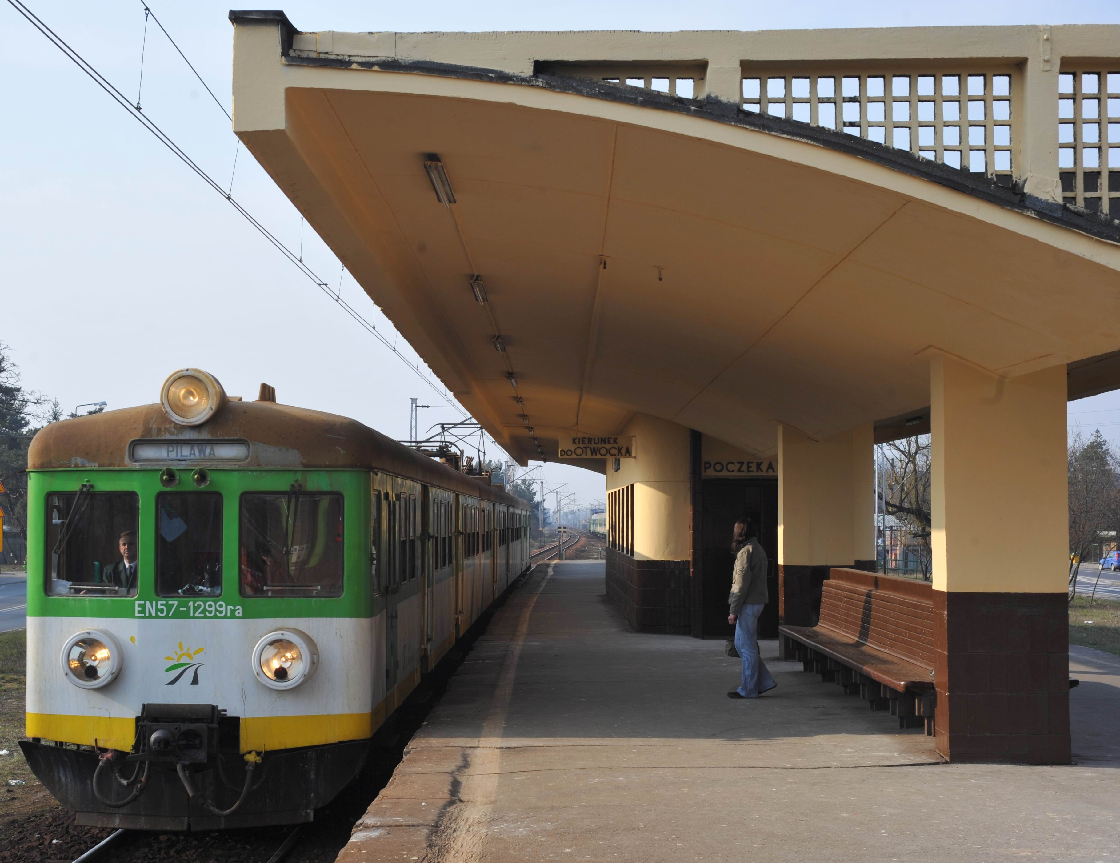 Stacja kolejowa Warszawa Radość (zabytek modernizmu 1936 r.).